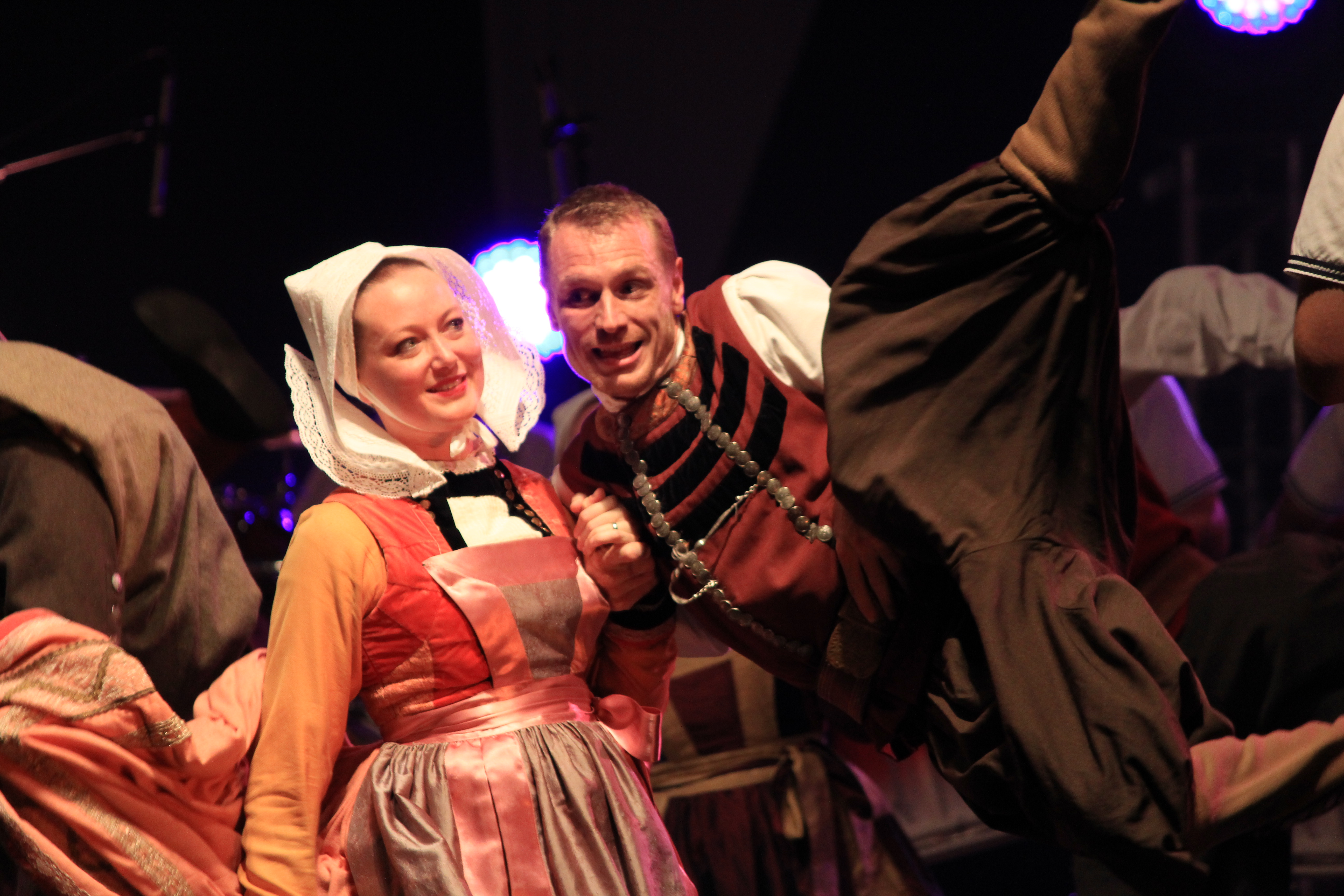 Le Bagad de Lann-Bihoué lors du concert celebrant son 60e anniversaire, organisé dans le cadre du festival interceltique de Lorient 2012.